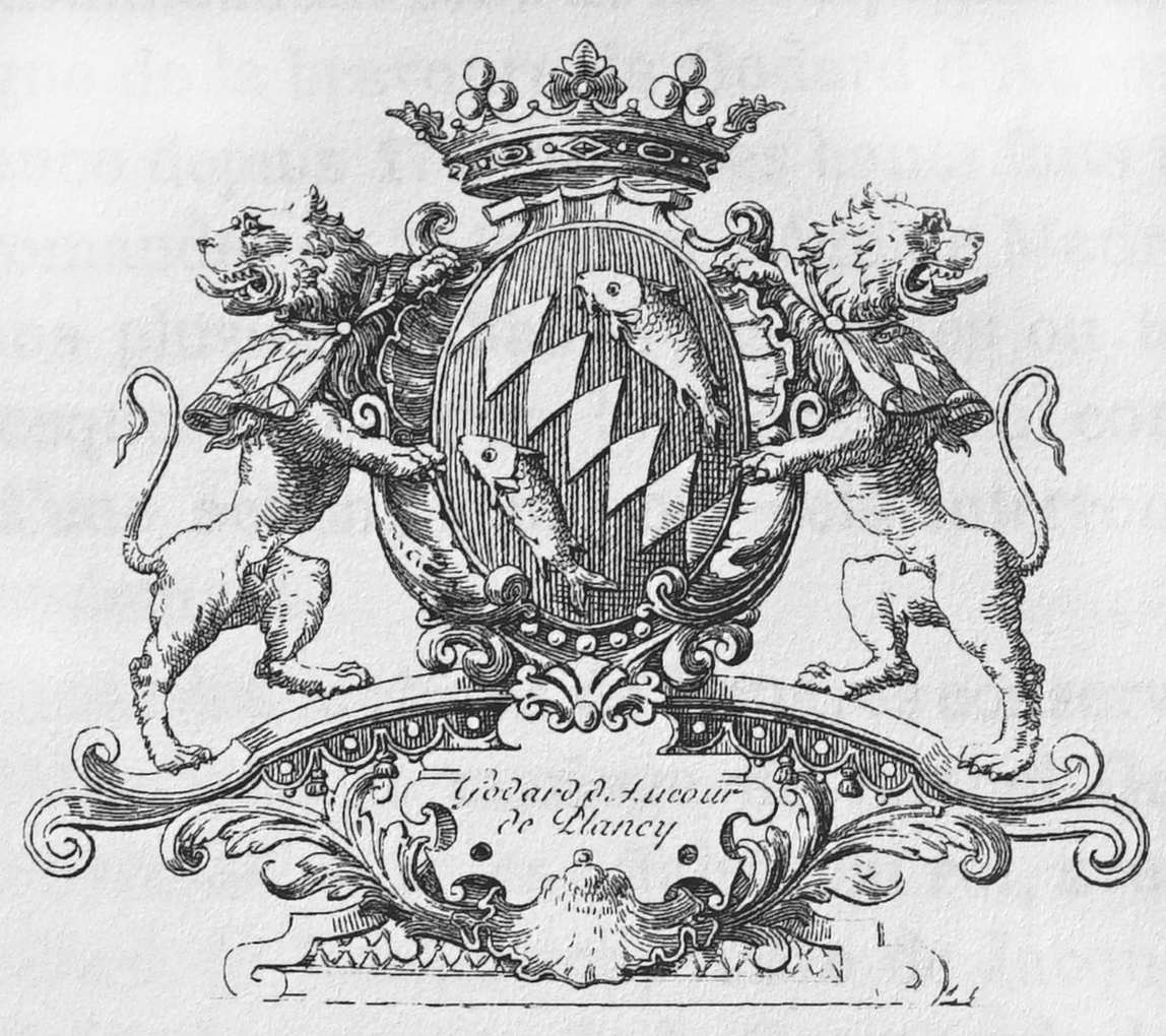 blason de la famille godart